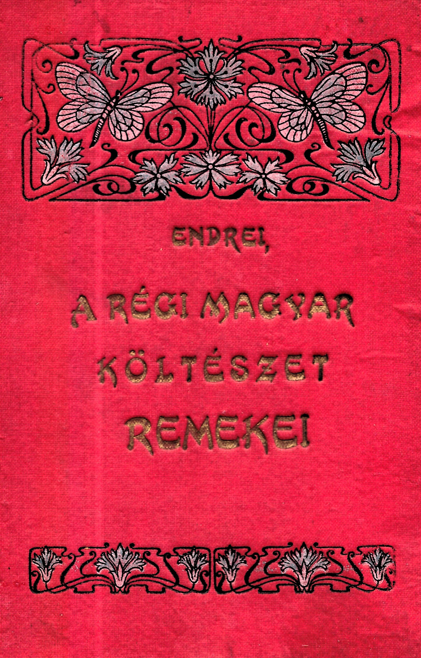 Endrei Zalán (1870-1933): A régi magyar költészet remekei (1903)